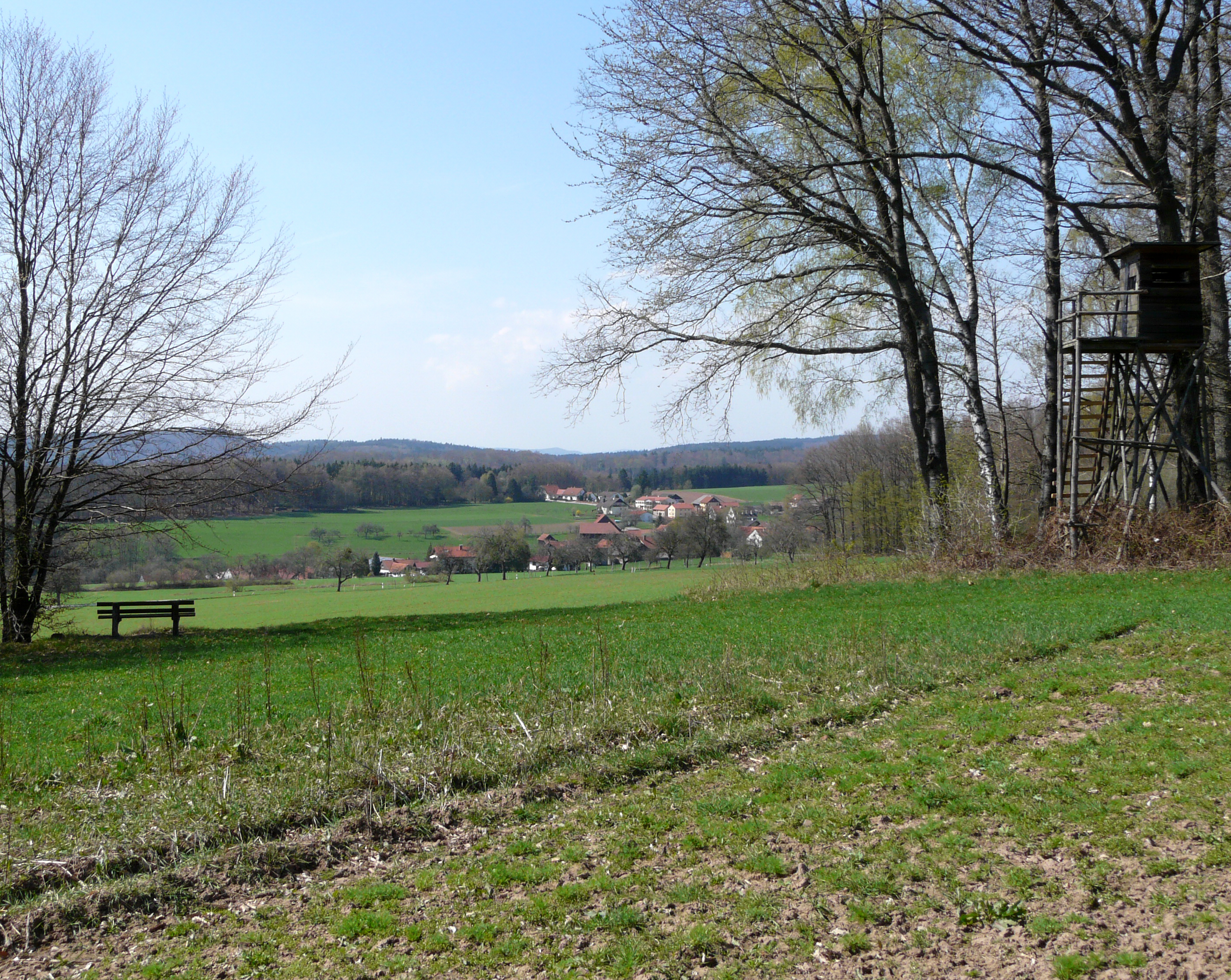 Blick auf Hesselbach (Hesseneck) von Südosten aus